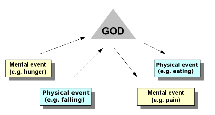 Schéma de fonctionnement de principe de l'occasionalisme